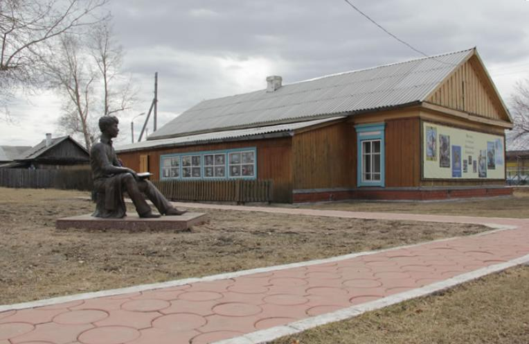 Музей и памятник А.В. Вампилову